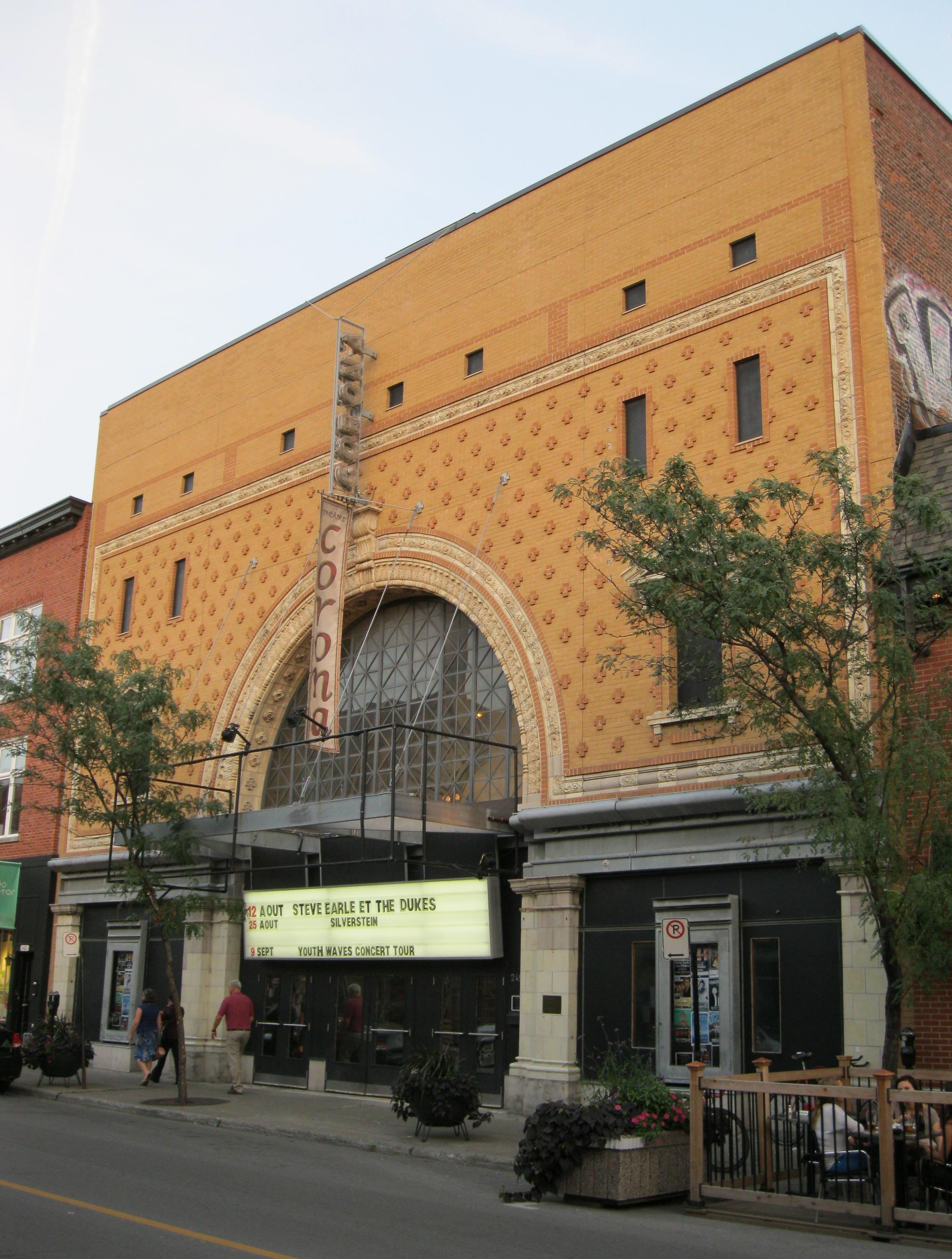 Le Théâtre Corona est situé au 2490 rue Notre-Dame ouest à Montréal.